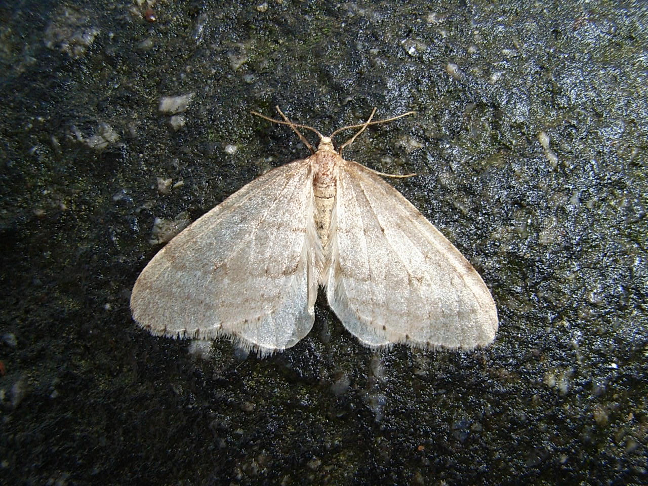 Buchenfrostspanner